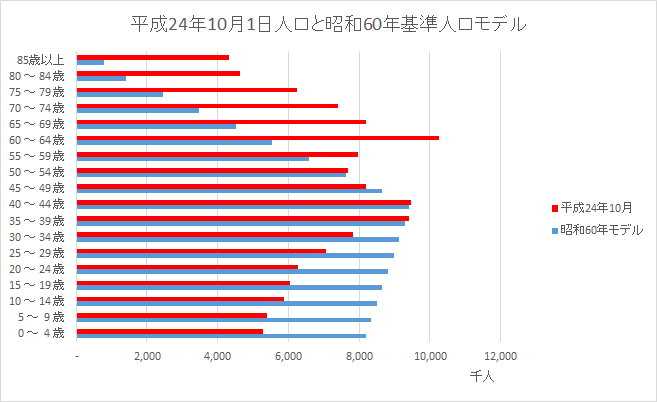 平成24年10月1日人口と昭和60年基準人口モデル